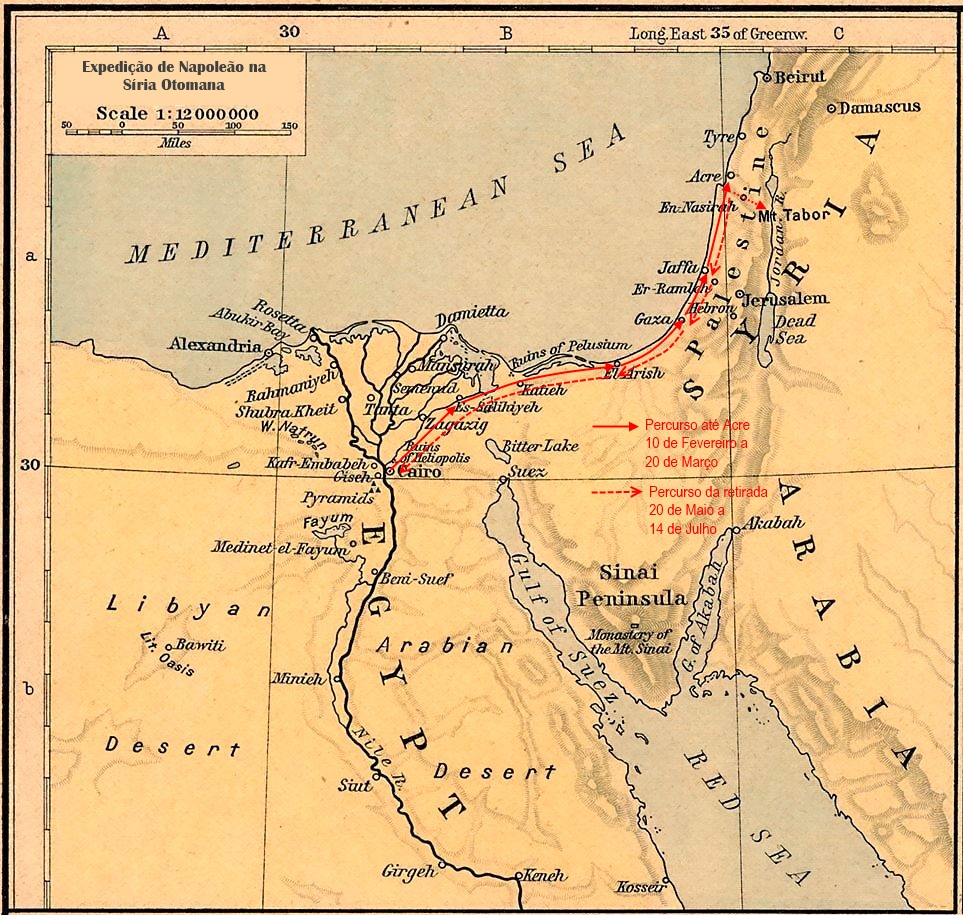 Mapa do Egipto e região mediterrânica do Médio Oriente onde se assinalam os principais movimentos da expedição francesa na Síria otomana em 1799.